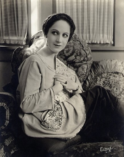 Claire Du Brey